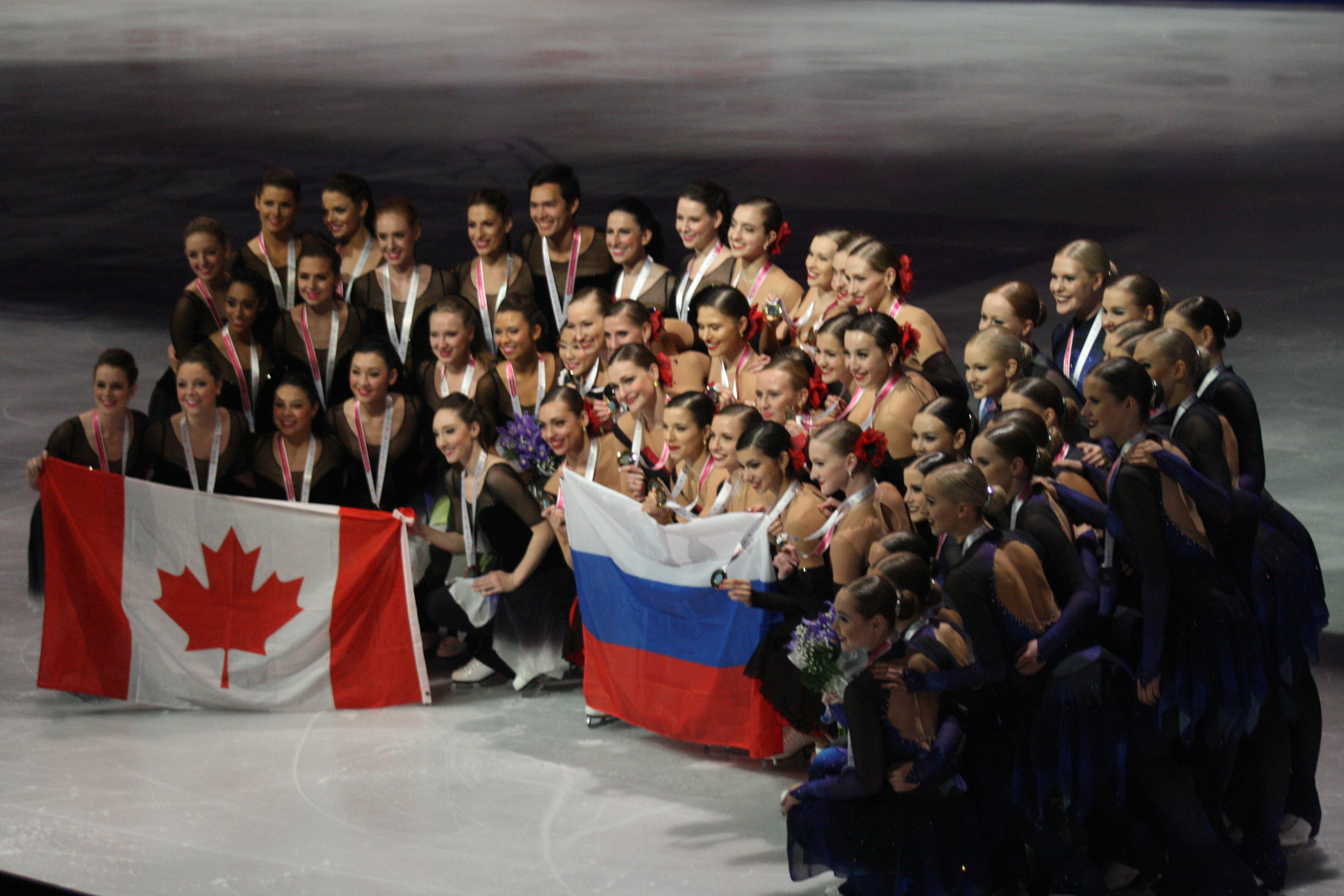 Награждение победителей и призёров соревнований по синхронному катанию на Финале Гран-при по фигурному катанию 2015-2016. Первое место - команда Paradise (Россия), Второе место - команда Rockettes (Финляндия), третье место - команда Nexxice (Канада).